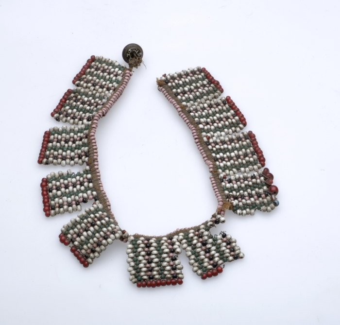 Het halssieraad bestaat uit een met twee rijen roze kralen bezet koord met aan één uiteinde een koperen knoop. Aan dit koord hangen elf bijna vierkante kralenwerken. Deze kralenwerken hebben eenzelfde patroon van witte, zwarte, roze en groene kralen en zijn aan de onderzijde afgewerkt met rode kralen. Het halssieraad werd gedragen door Zulu-meisjes die door middel van de verschillende kleuren hun geliefde bepaalde boodschappen konden overbrengen. Voorzichtigheid is geboden bij het 'vertalen' van de boodschappen omdat er geen eenduidige betekenis van de kleuren bestaat, zo zijn er naast culturele ook regionale variaties en kan de betekenis ook per familie varieëren. De kleurstelling van dit sieraad zou echter het volgende kunnen betekenen: "Ik heb je lief" (wit), "maar er zijn moeilijkheden" (zwart) "omdat je geen vee hebt voor de bruidsprijs" (roze) en "daarom voel ik me slap en ziek" (groen). "Ik heb rode ogen van het turen maar je komt niet" (rood) en "ik wou dat ik een duif was, dan kwam ik kruimels pikken bij je deur" (blauw).